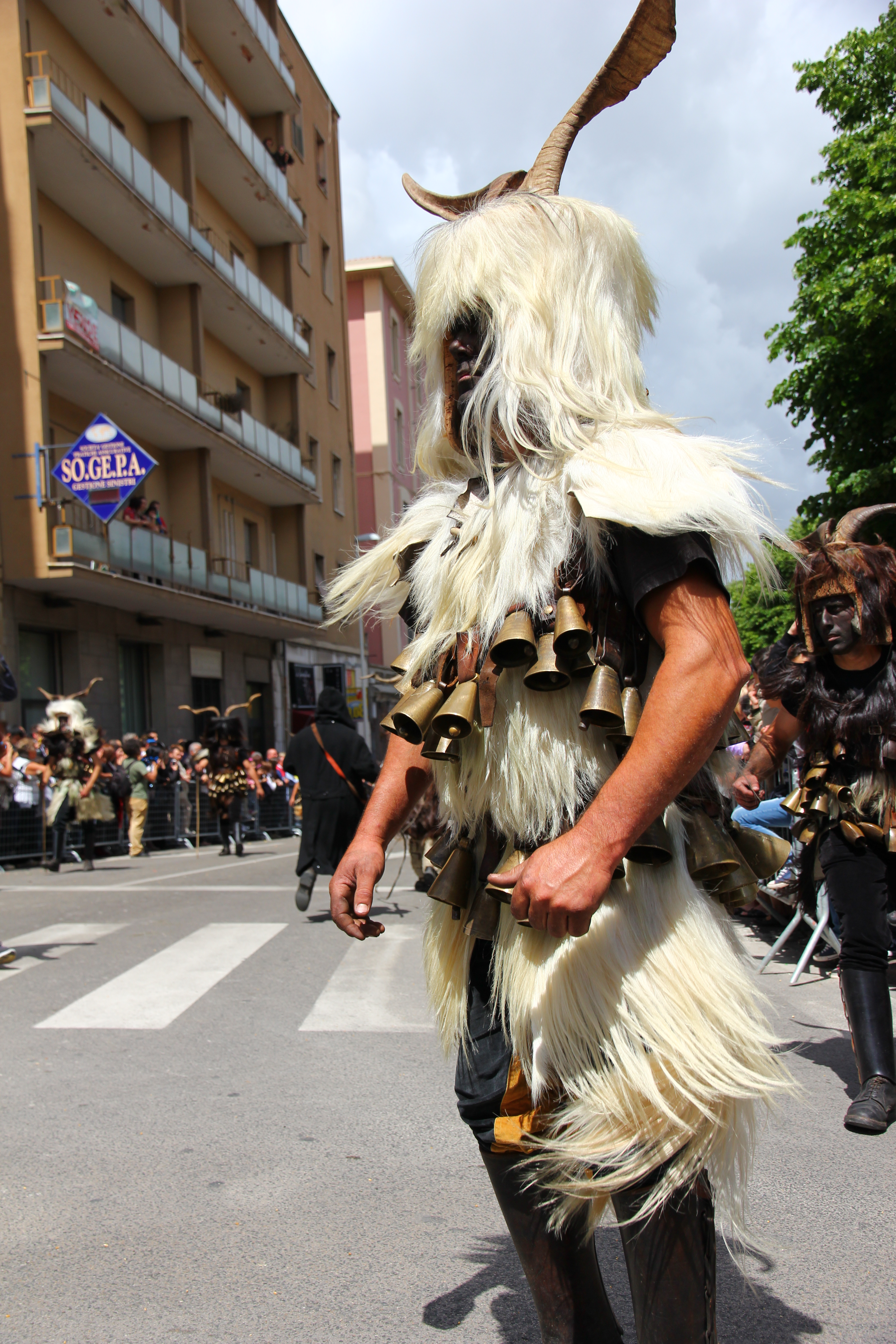 Cavalcata Sarda 2013 (Sassari)